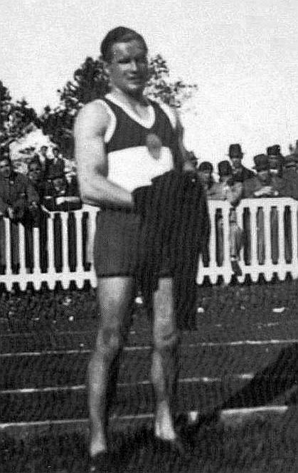 Gilbert Auvergne en mars 1932.